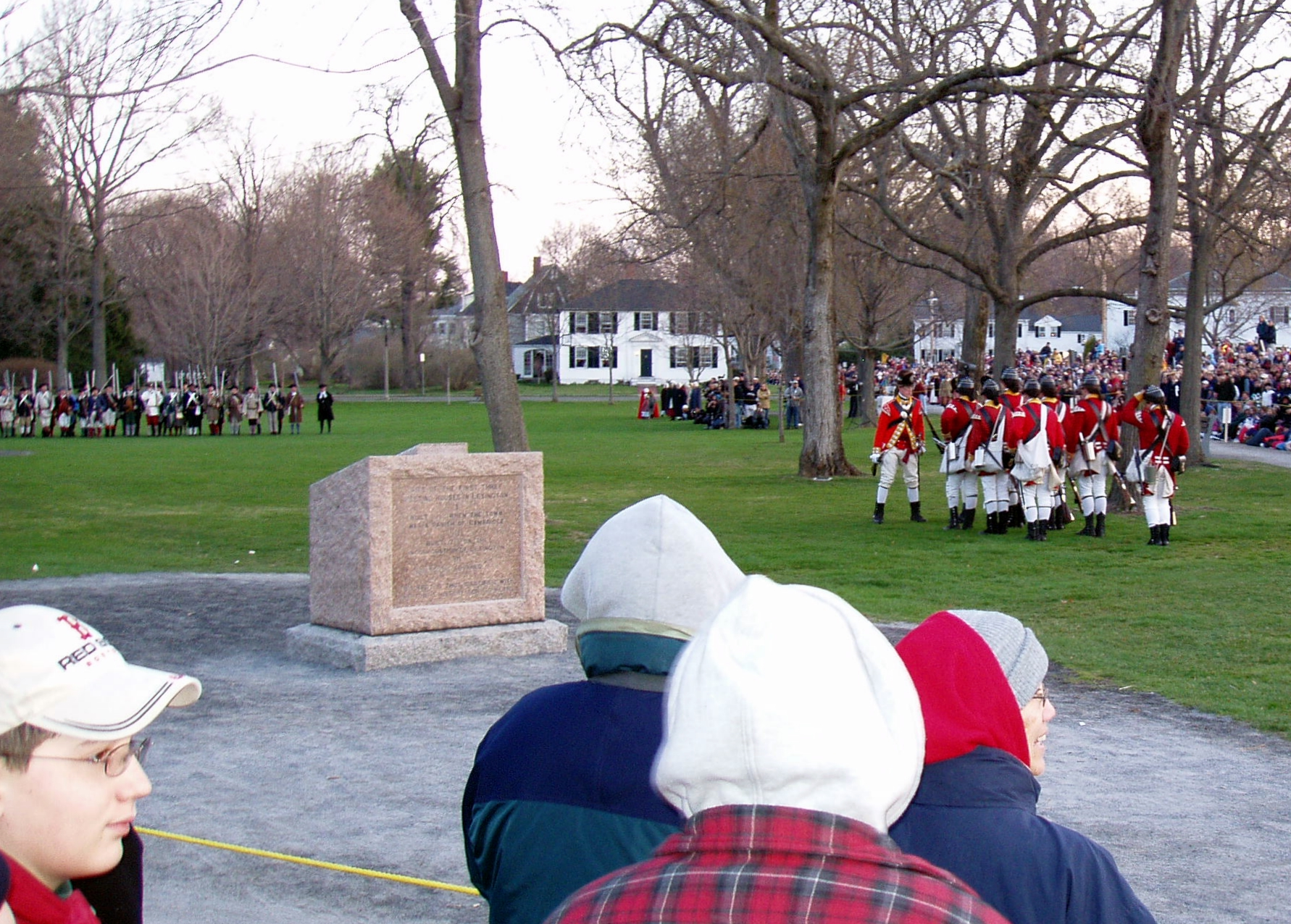 zelf genomen, april 2005